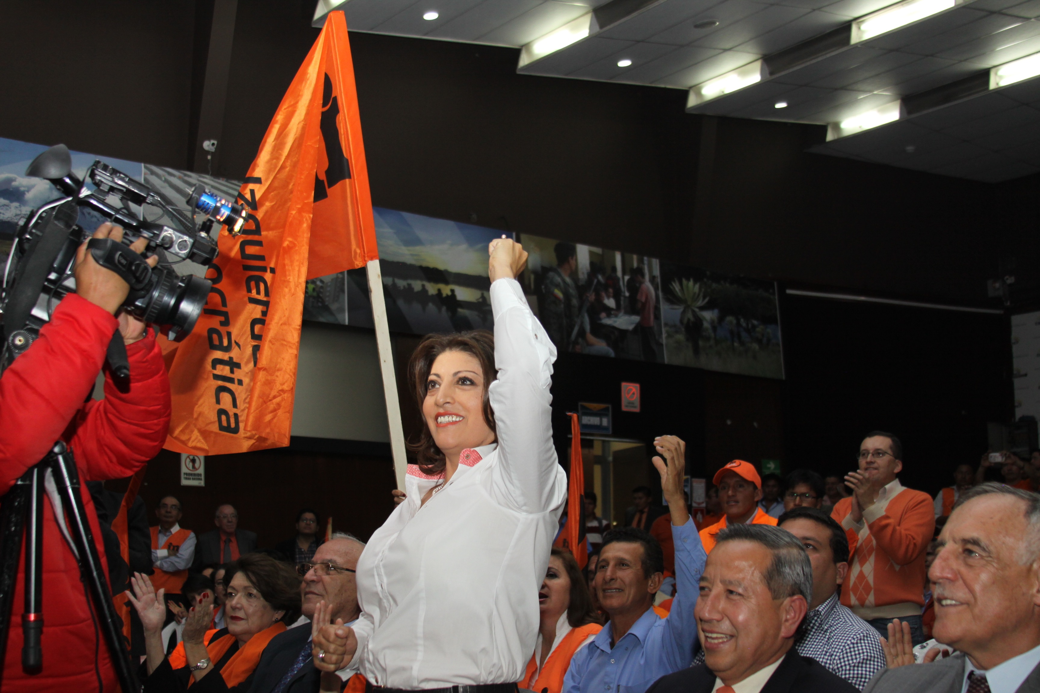 Wilma Andrade, durante la entrega de las primeras 300 mil afiliaciones de Izquierda Democrática al CNE para lograr su reconocimiento jurídico, en marzo del 2016. Acto histórico para esta recordada organización política.